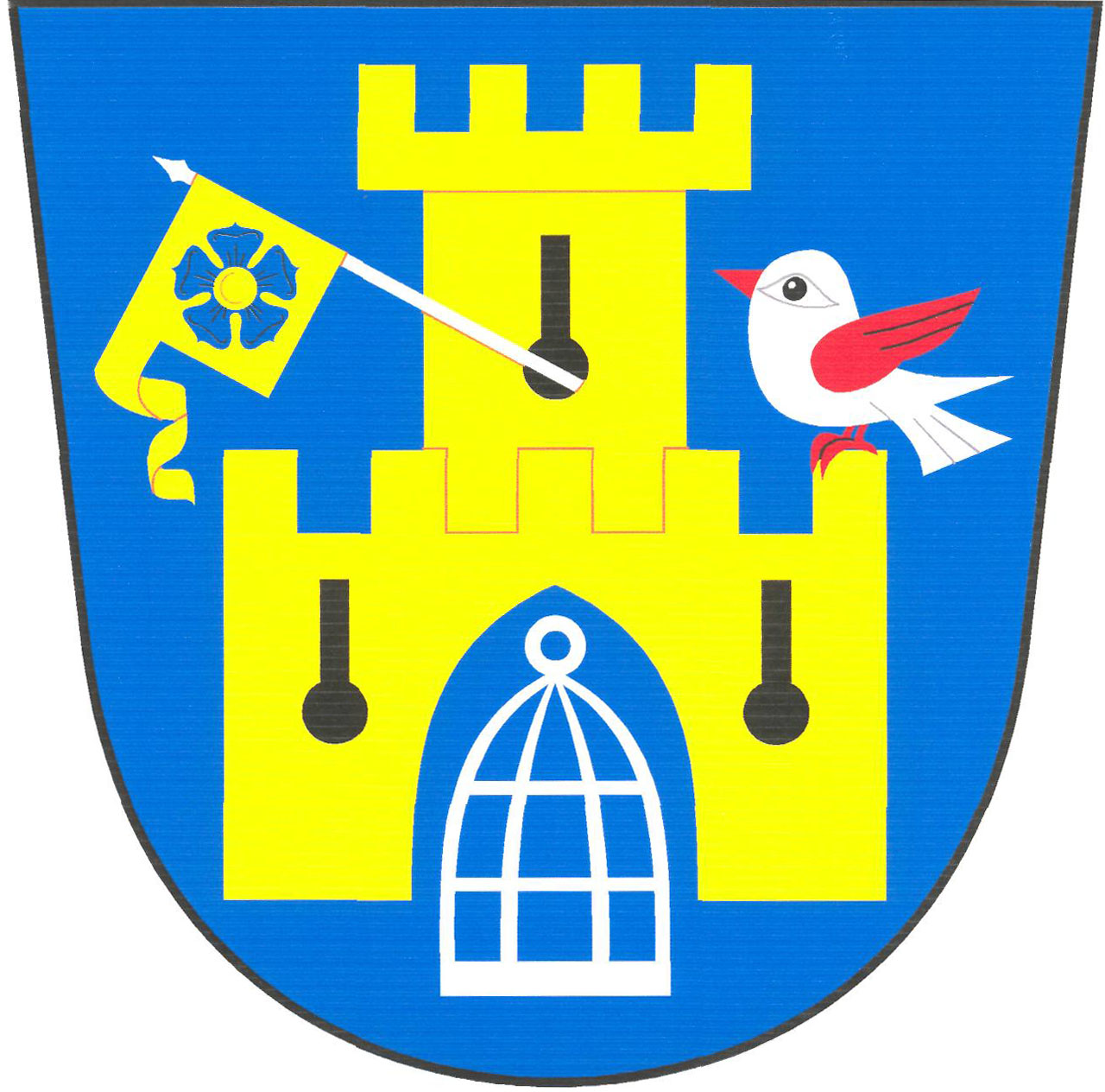 Znak obce Klec (okres Jindřichův Hradec)